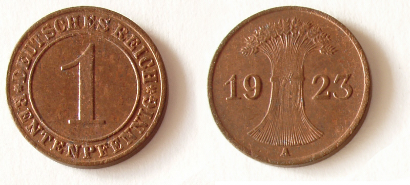 Deutsches Reich - Münze: 1 Rentenpfennig, 1923, d=17.5 mm, 2 gramm, Bronze (Cu 950, Sn 40, Zn 10).